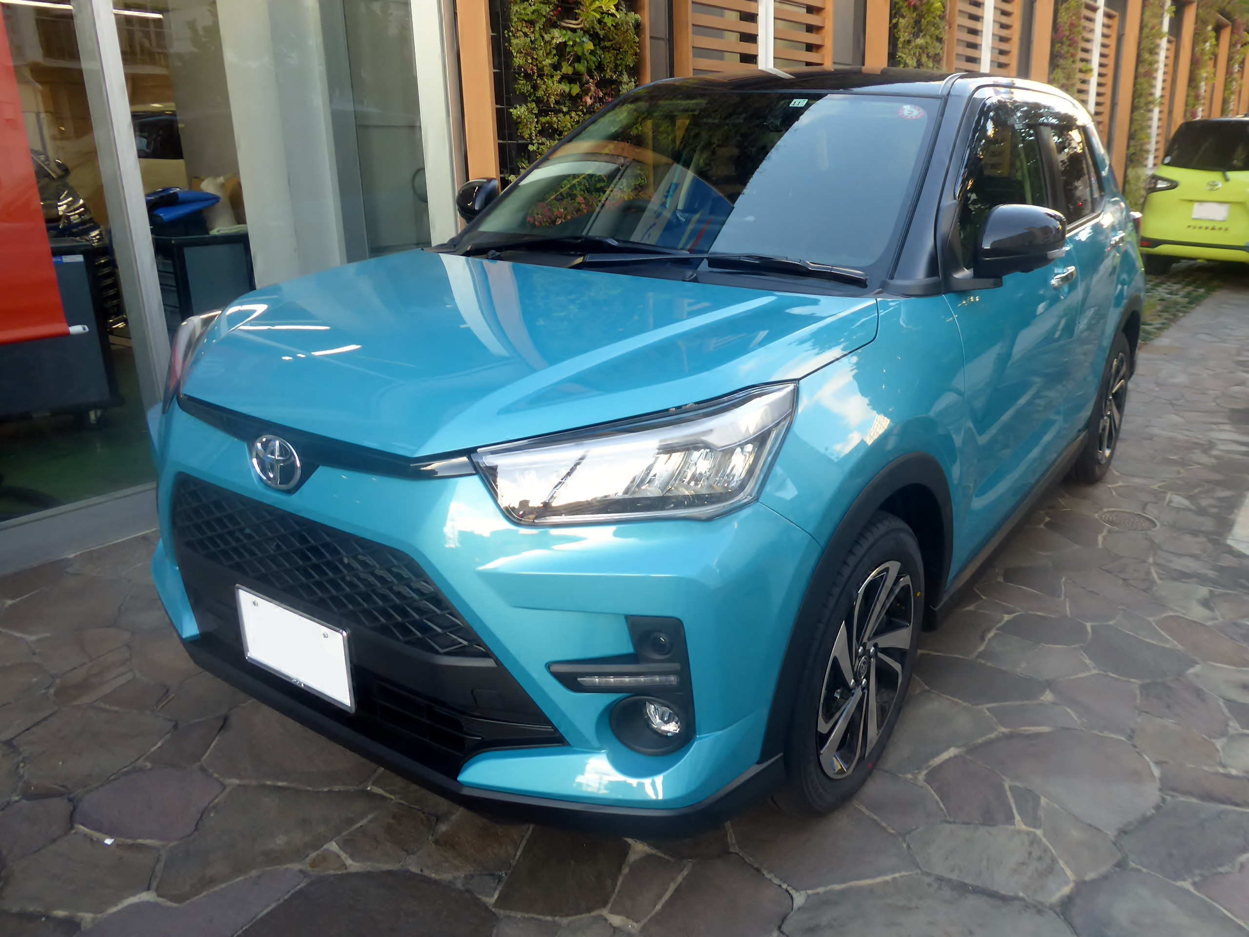 5BA-A210A-GBSV型トヨタ・ライズZ 4WDをフロントから撮影。